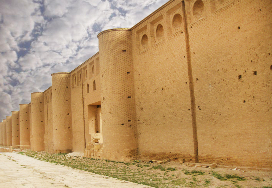 آثار العراق القديمة المشهورة في الجهة الغربية لمدينة سامراء